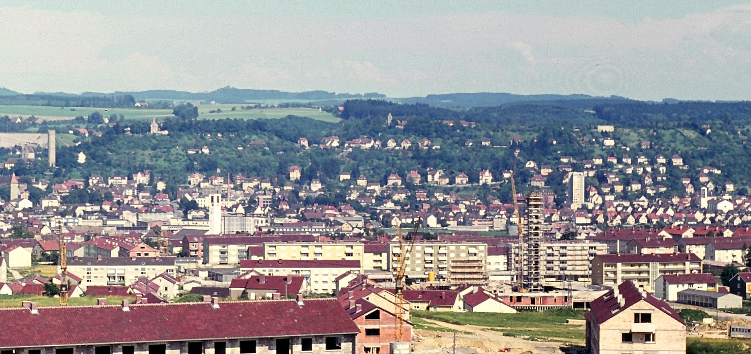 Ravensburg, Germany: Weststadt (Mittelösch), katholische Dreifaltigkeitskirche im Bau